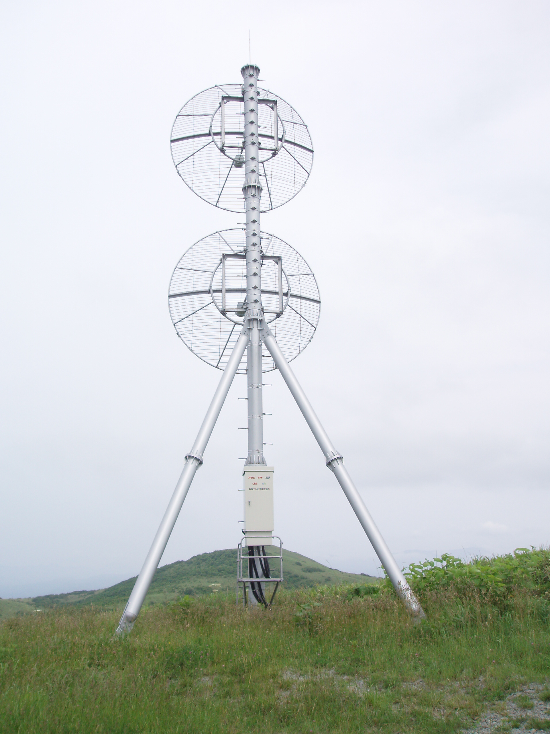 島牧中継局 HBC・STV・HTB・UHB・TVh受信設備